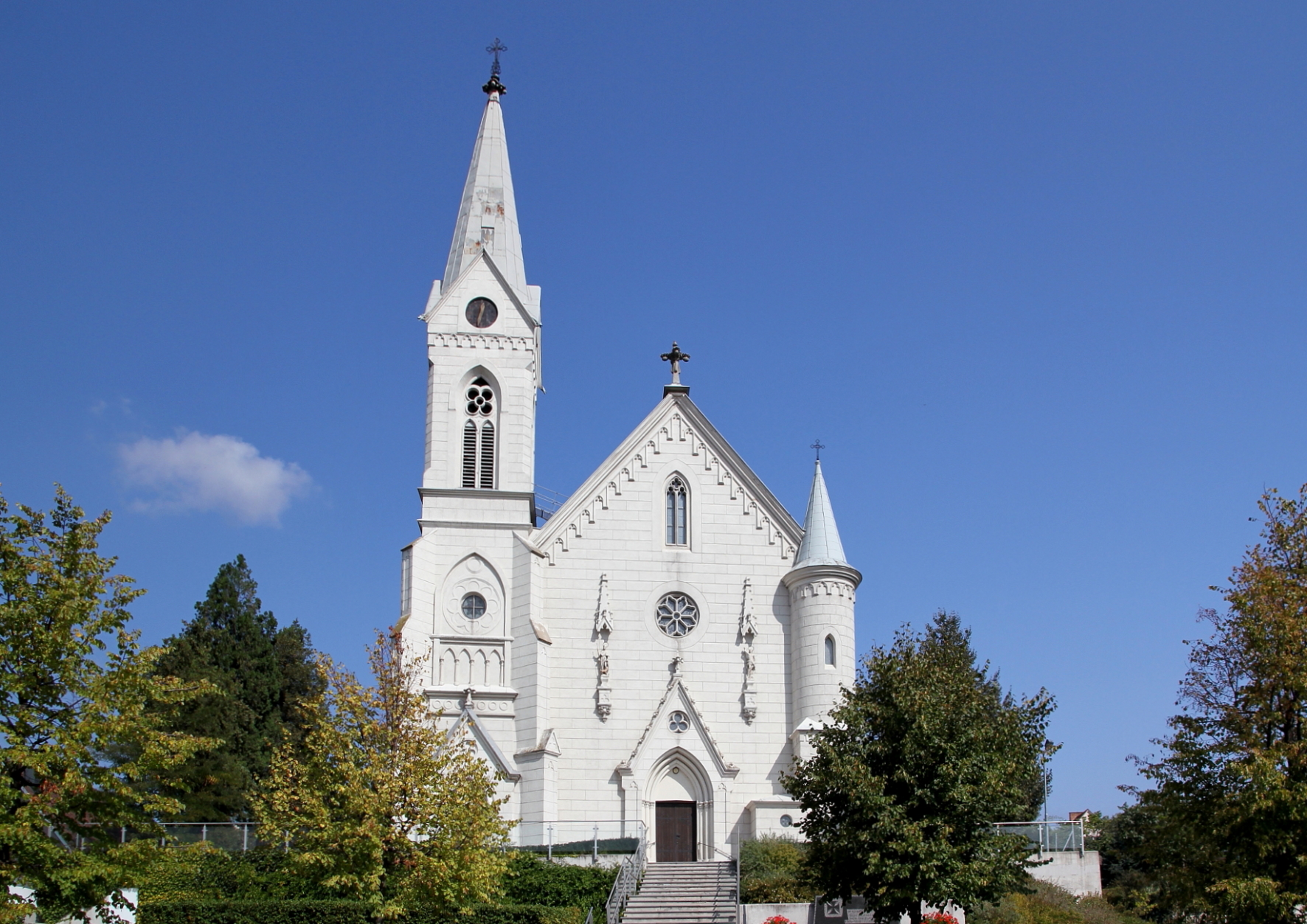 Die kath. Pfarrkirche hl. Ägidius in der burgenländischen Gemeinde Müllendorf.